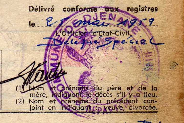 image d'un cachet humide de la commune de Djenane